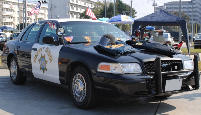 日本で登録されたクラウンビクトリアの元パトカー。